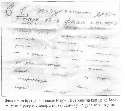 Факсимил брзојава војводе Мирка Петровића коју је из Куча упутио брату господару, књазу Данилу 12. јула 1856. године, првог дана похаре Куча